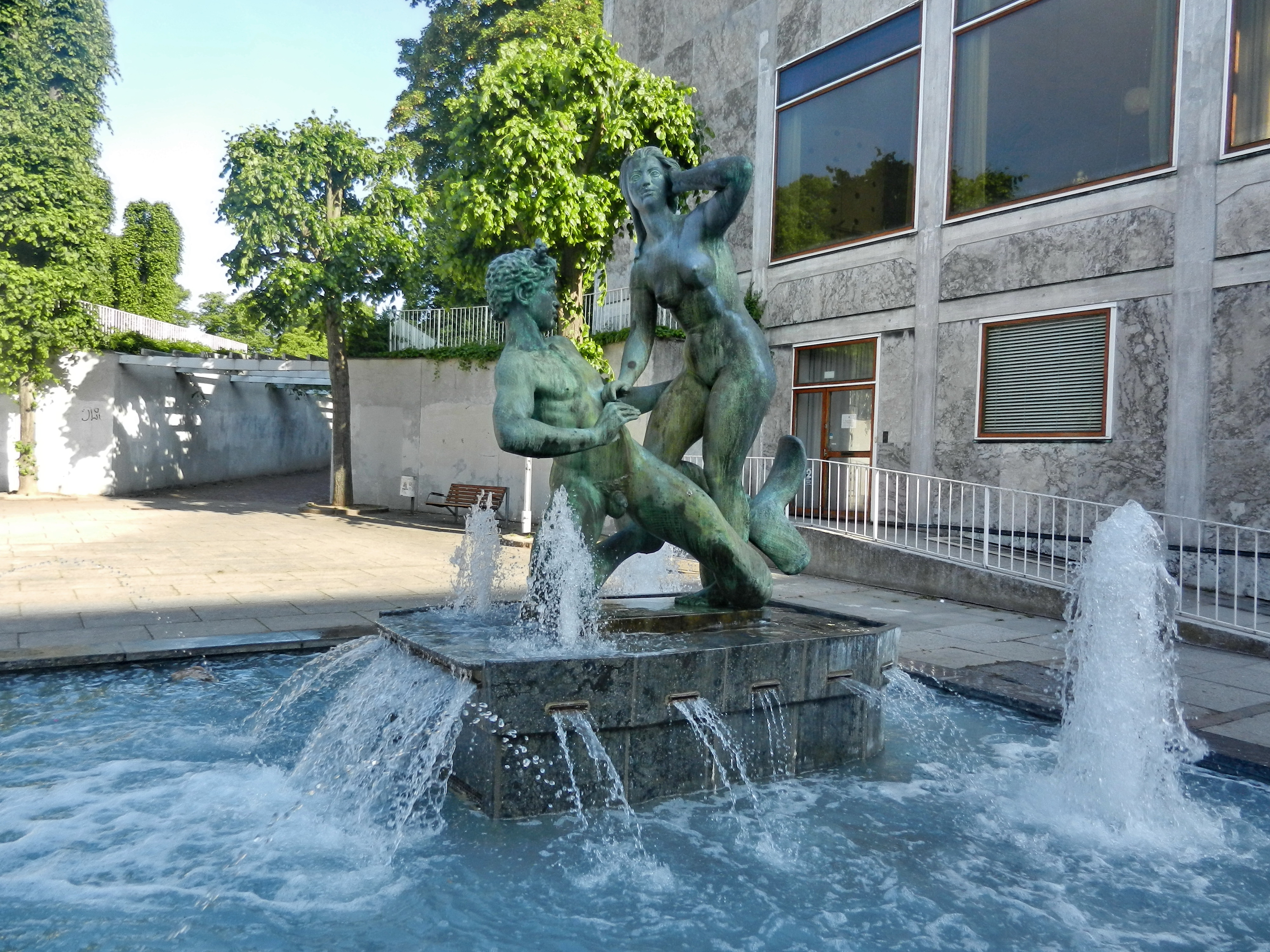 Aarhus